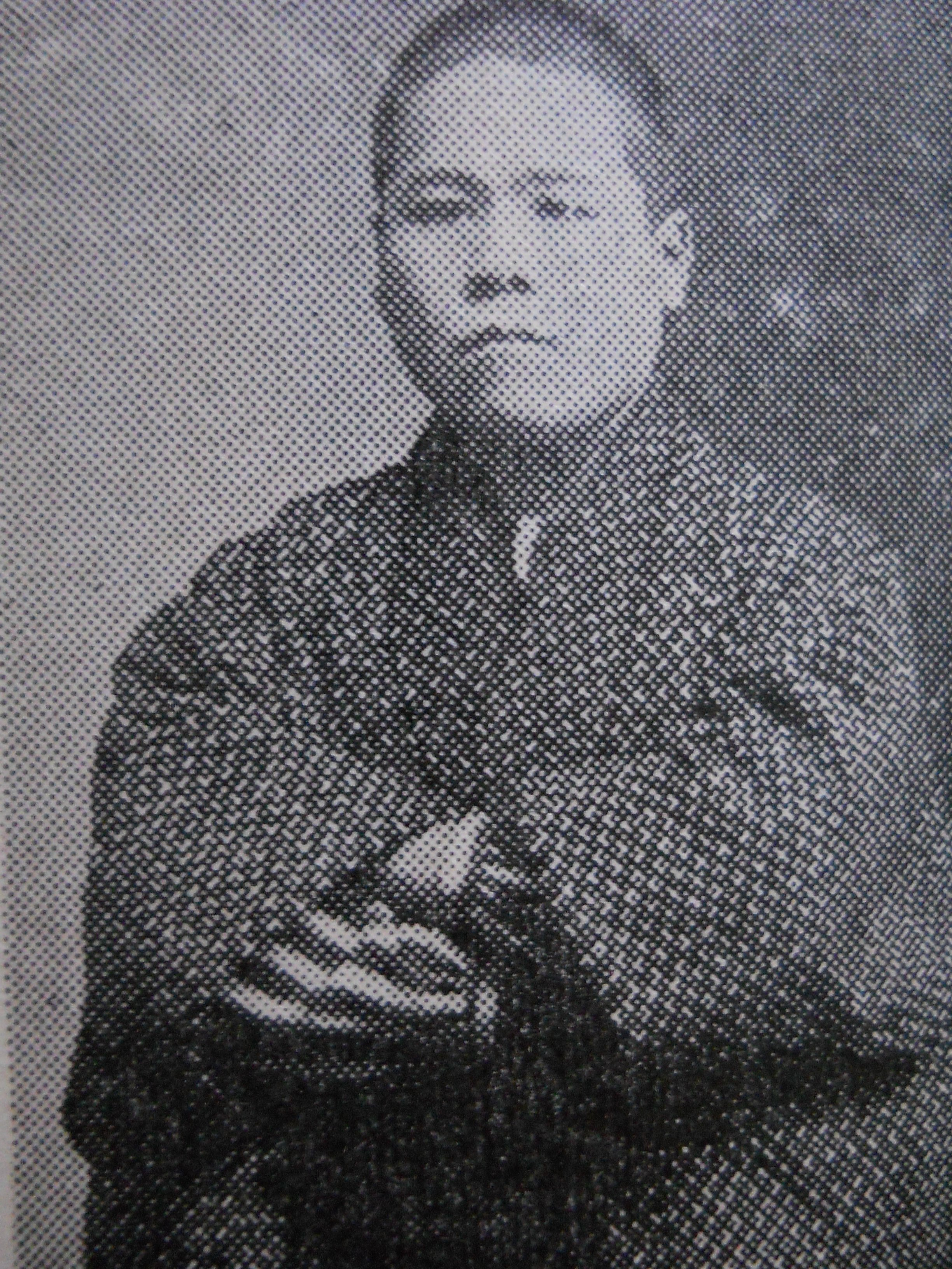 Nosaka Kanzi